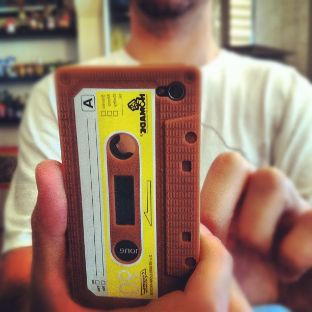 Après 2 semaines de coque spéciale mariage, ce week-end je pars en mode vintage... #case #iphone #coque